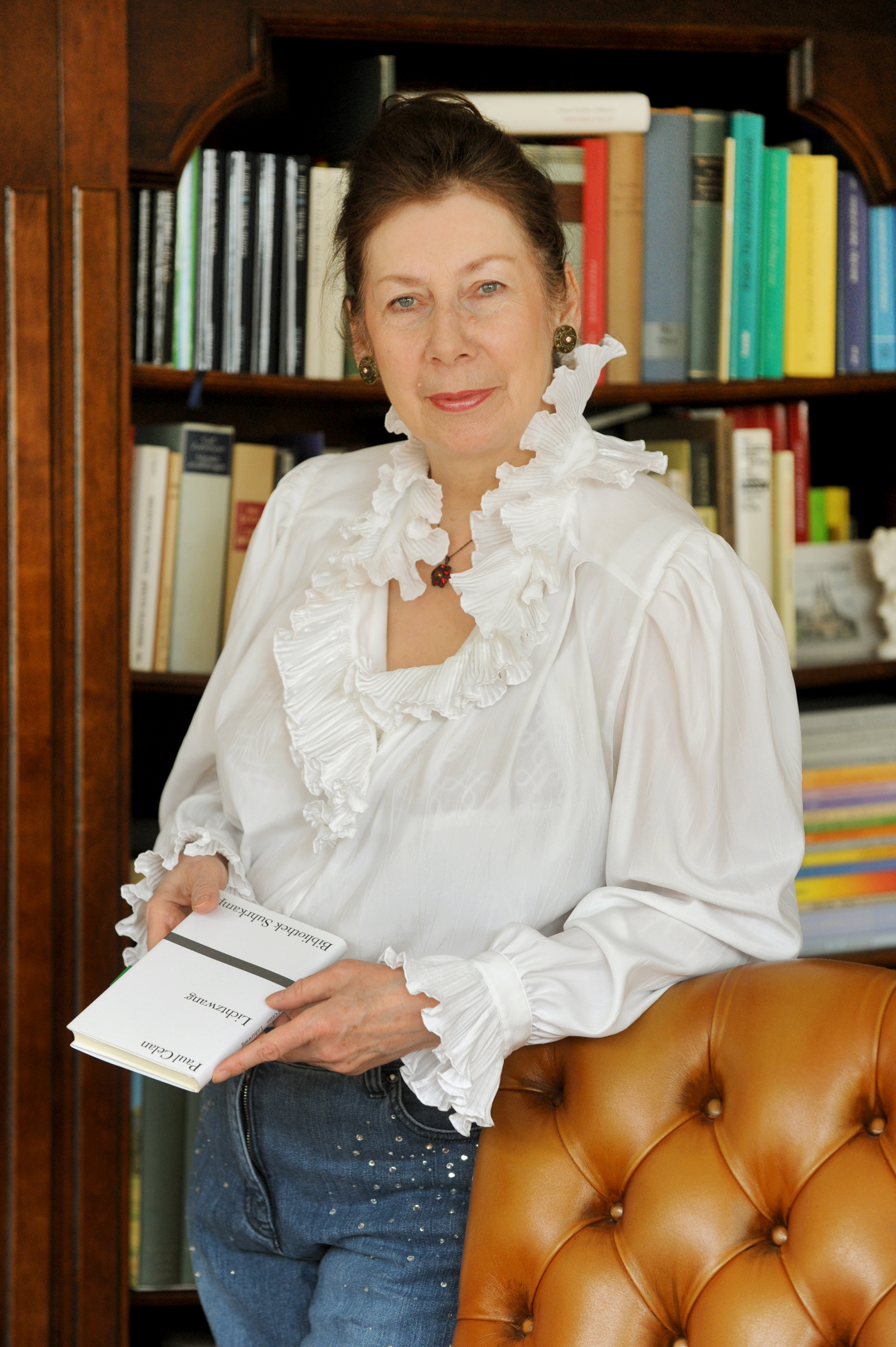 Konstanze Petersmann, Salon